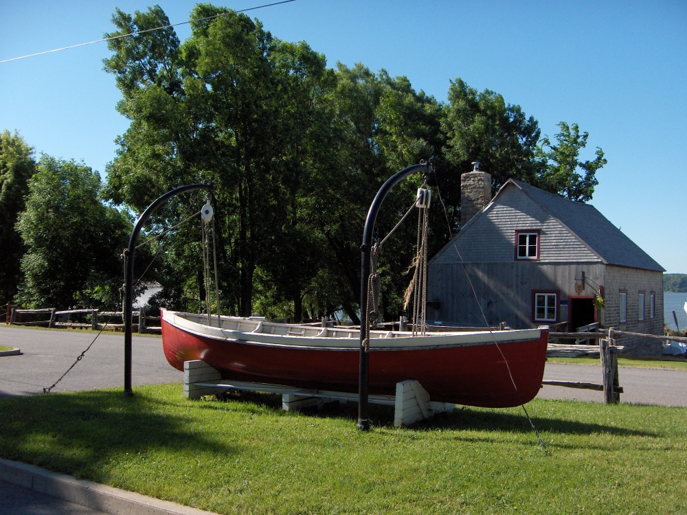 La Chalouperie à l'Île d'Orléans